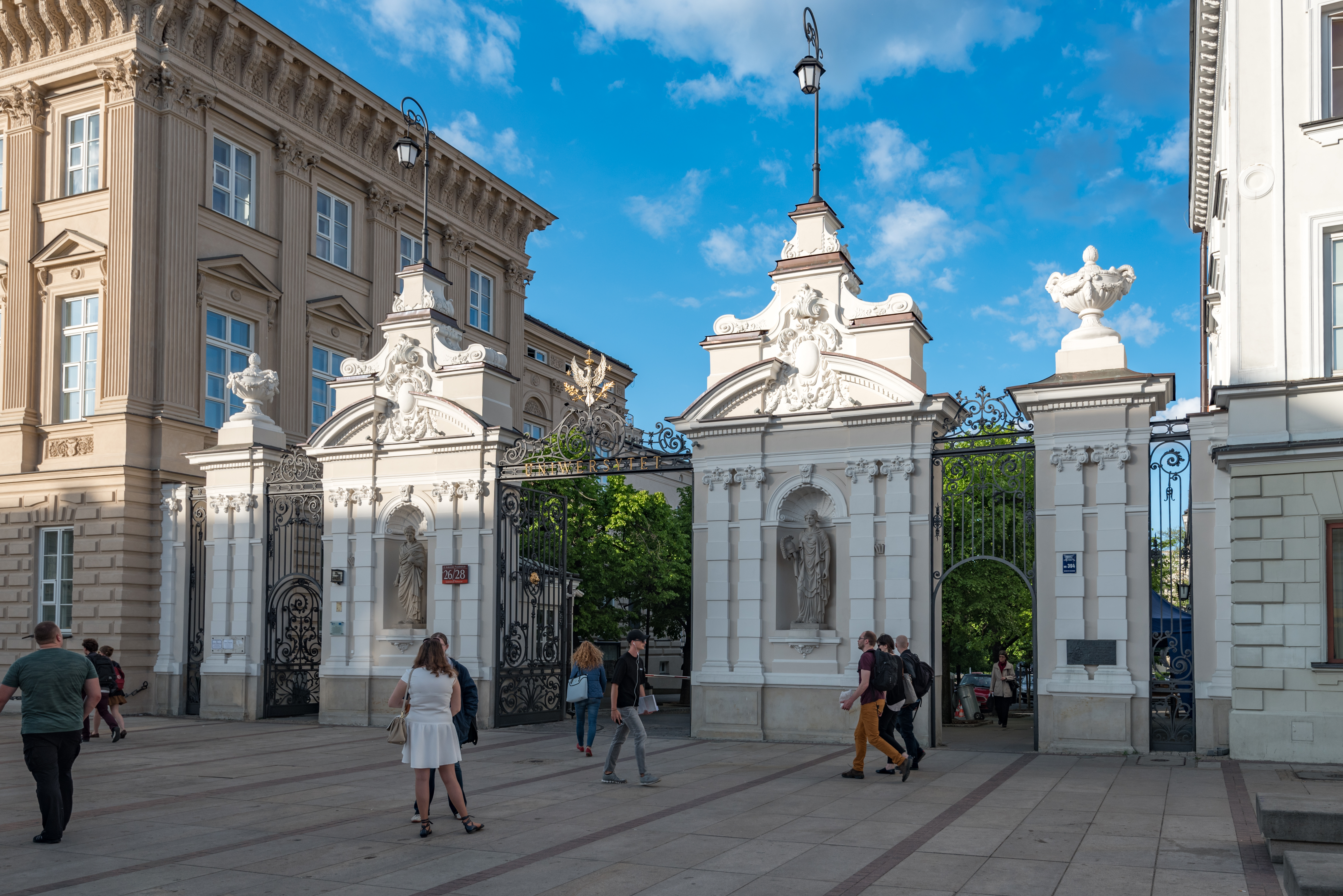 Warszawa, ul. Krakowskie Przedmieście 26-28